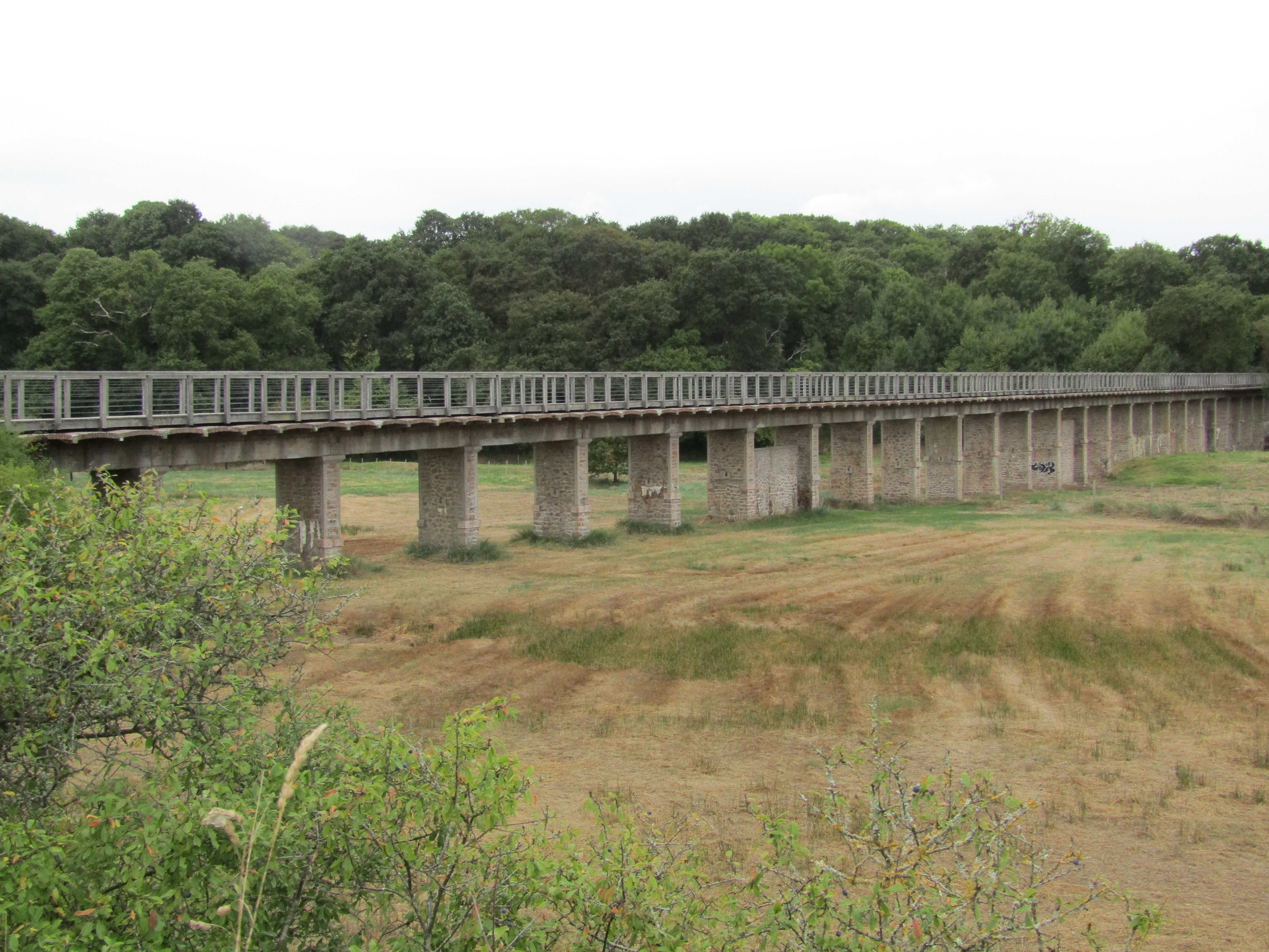 La passerelle de la Côtière; Photo prise entre la passerelle et le Pont des Marais